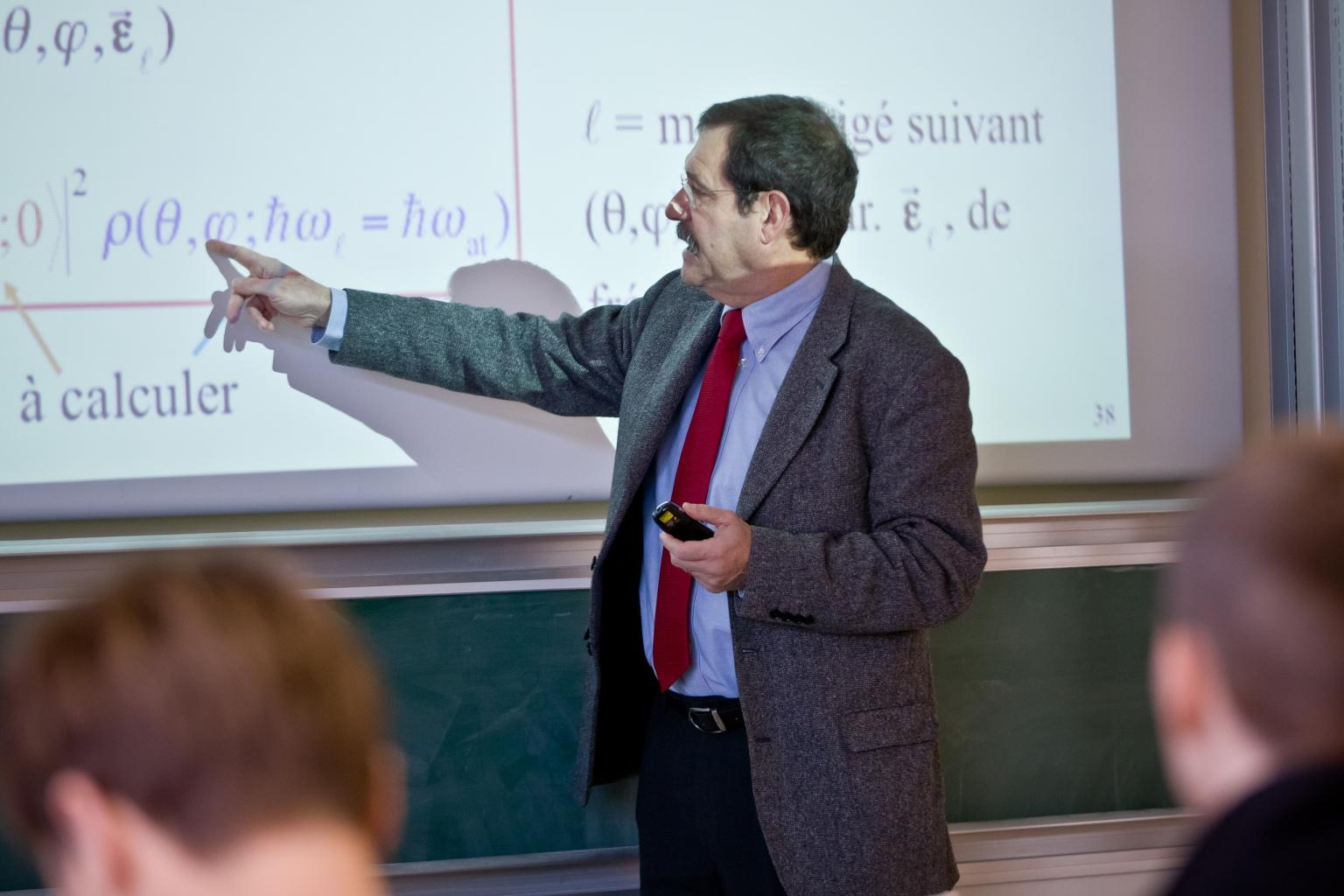 Photo d'Alain Aspect, en cours à l'École polytechnique